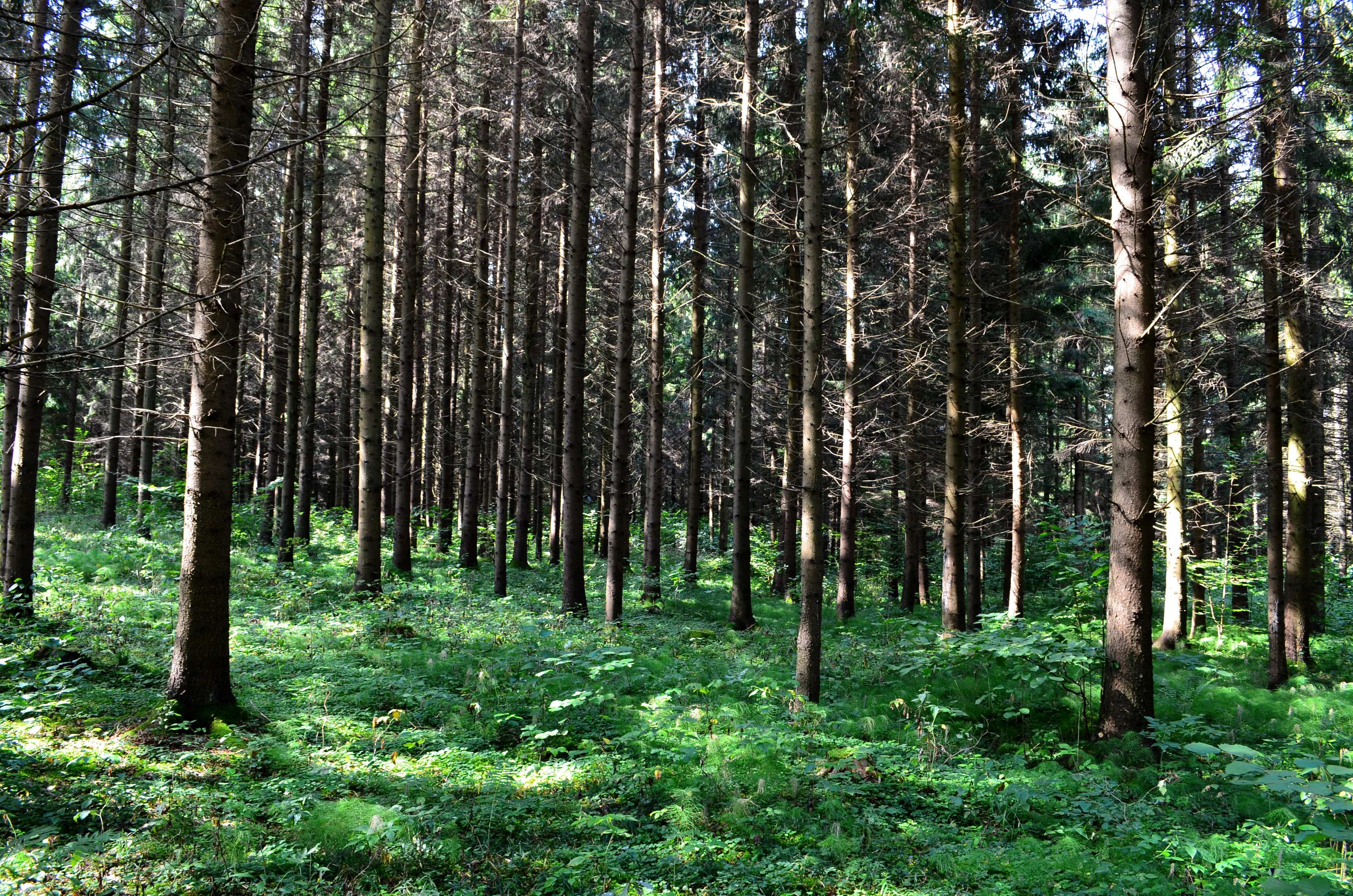 Varnabūdės giria netoli Utalinkos, Kazlų Rūdos sav.